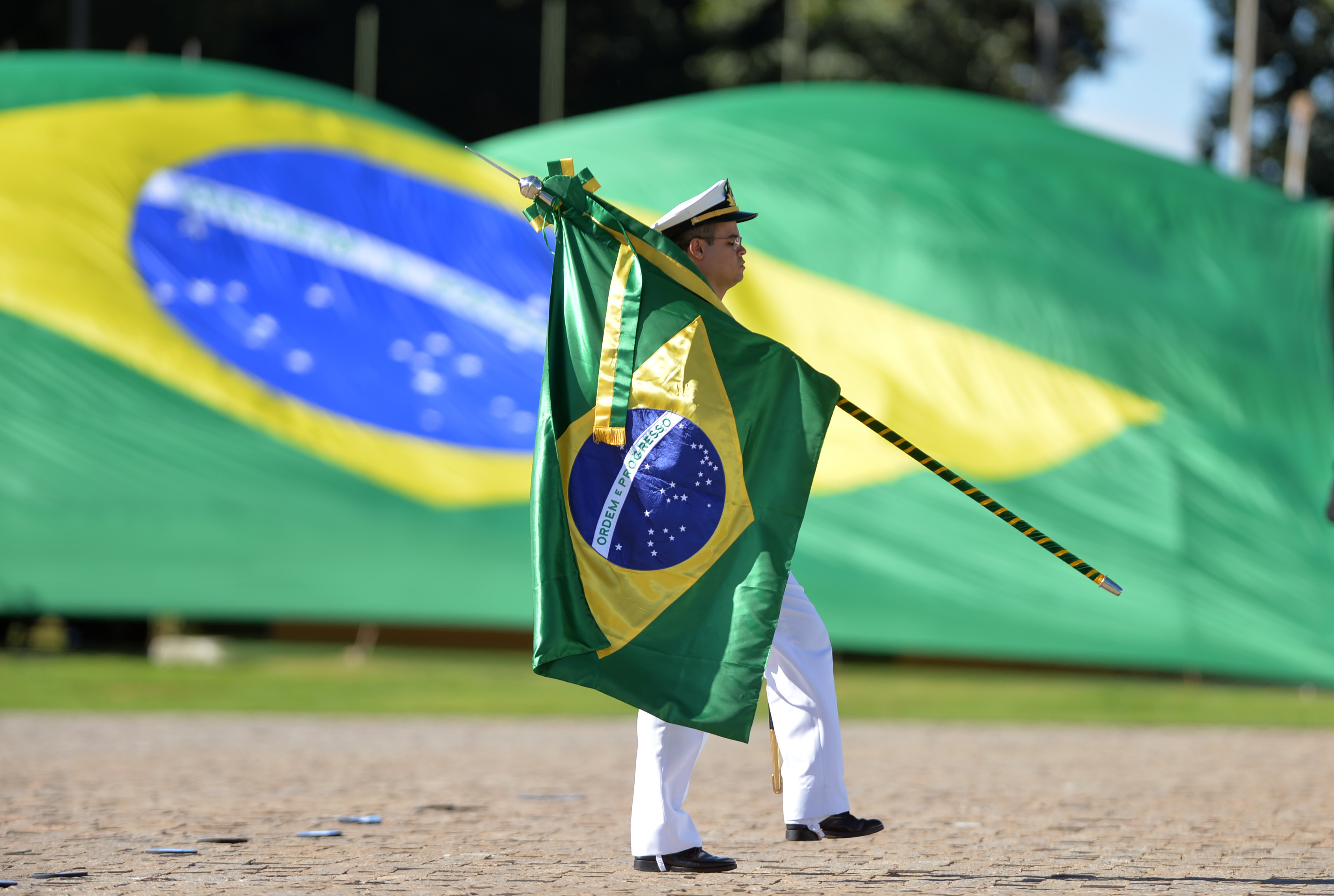 11/06/2014, Brasília - DF Fotos: Tereza Sobreira